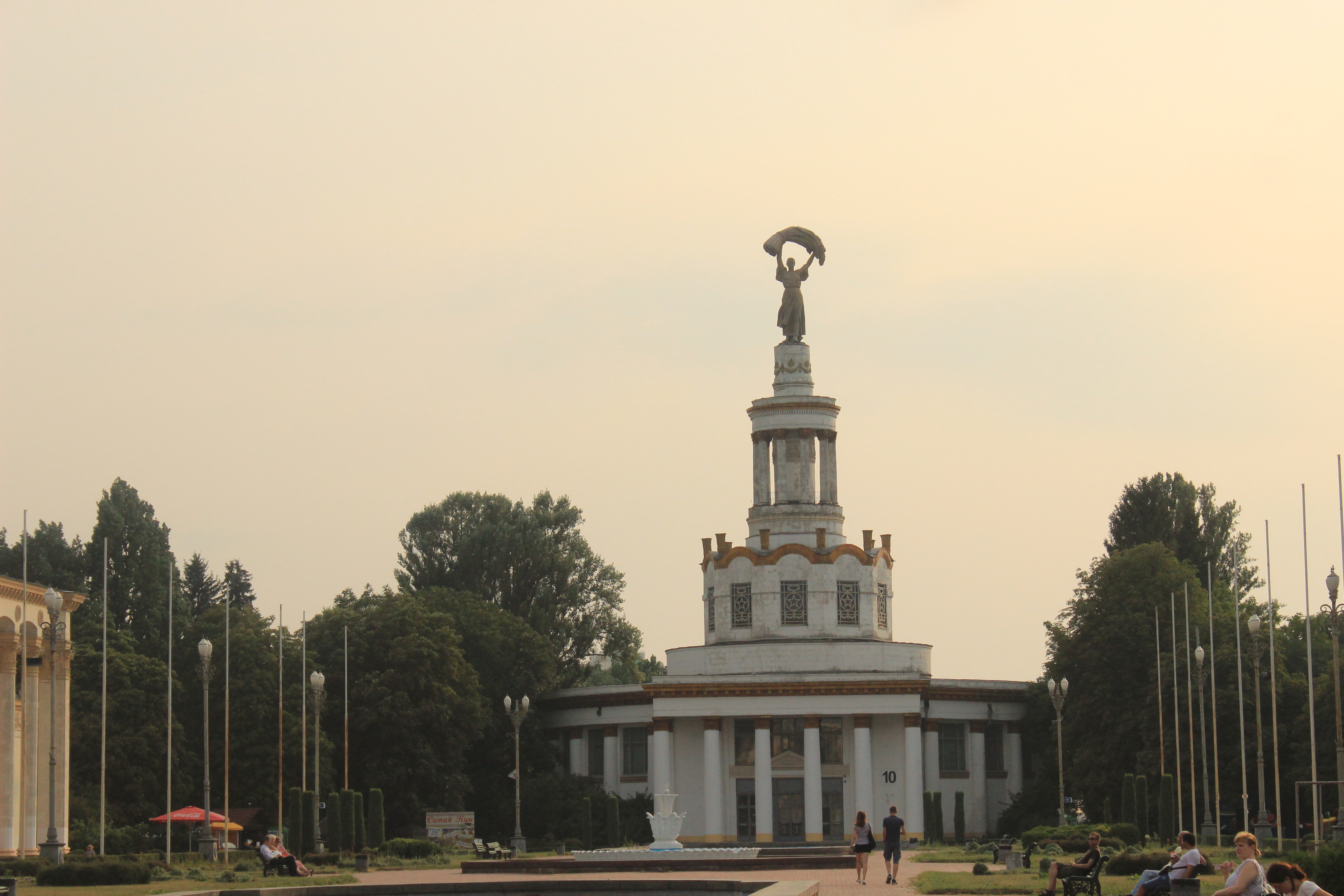 Павільйон «Зернові та олійні культури» № 10, Київ, Глушкова Академіка просп., 1